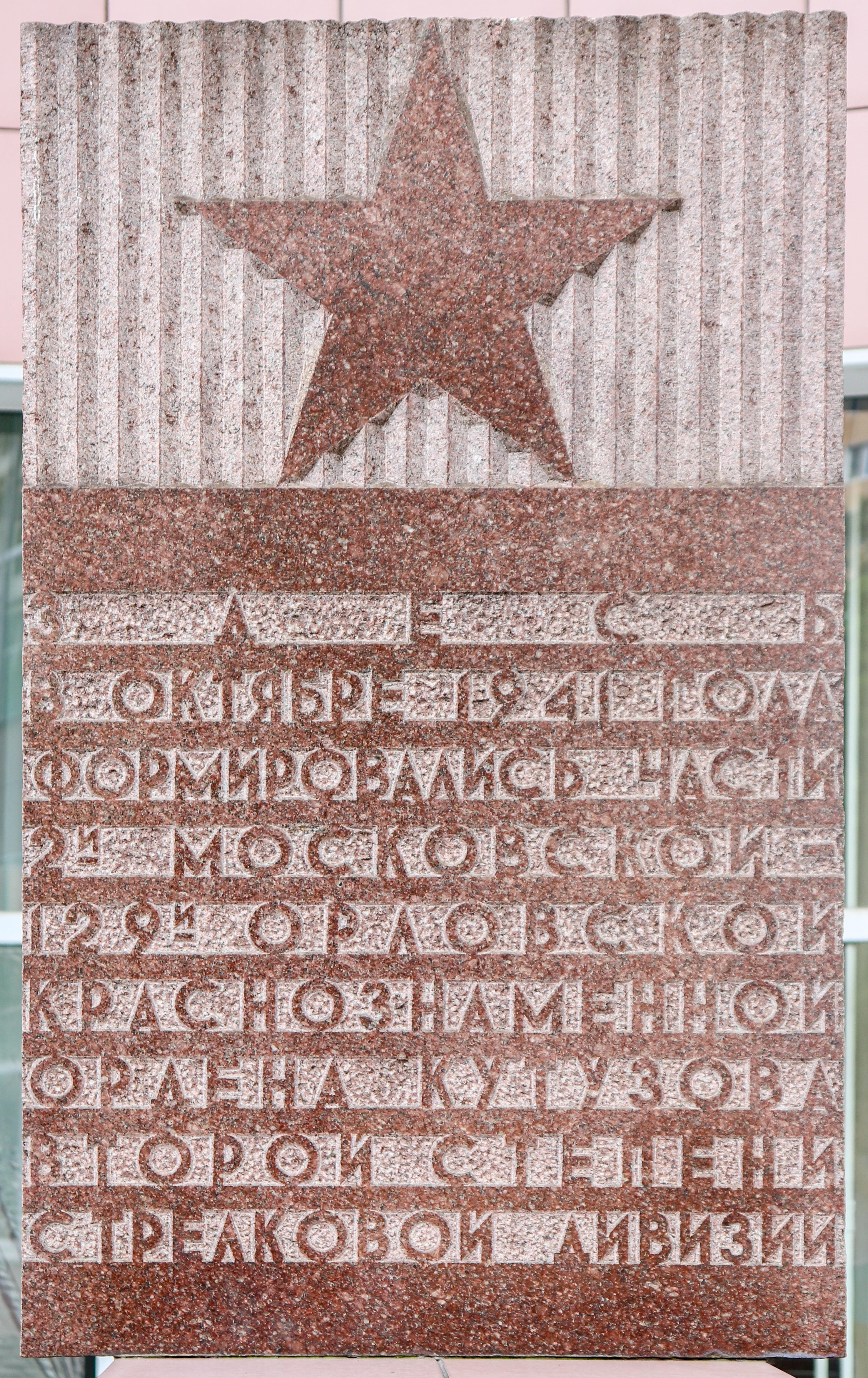 Мемориальная доска памяти частей 2й Московской - 129й Орловской Краснознаменной ордена Кутузова второй степени стрелковой дивизии. Доска из красного гранита с изображением пятиконечной звезды, была установлена в 1965 году во дворе школы № 1500 (Верхняя Красносельская улица, 30).